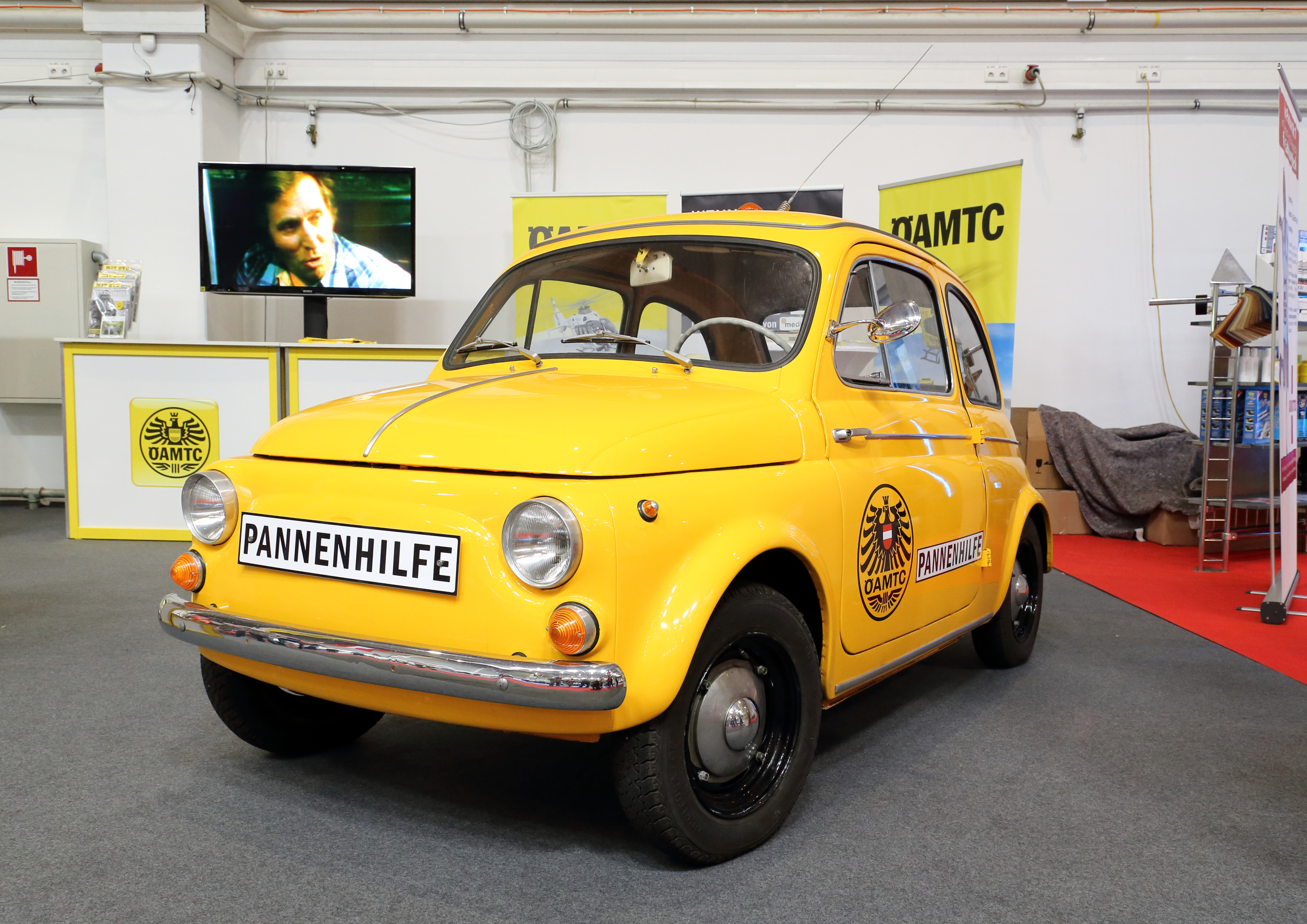 Ein Puch 500 als historisches ÖAMTC-Pannenhilfe-Fahrzeug bei der Oldtimermesse 2014 in Tulln. Nachdem 1957 der erste Steyr Puch 500 gebaut wurde, testete der ÖAMTC 1958 dieses Modell für den Einsatz als erstes Pannenhilfe-Auto. 1959 stellte der ÖAMTC 61 Puch 500-Pannenfahrzeuge in den Dienst (bis 1973).